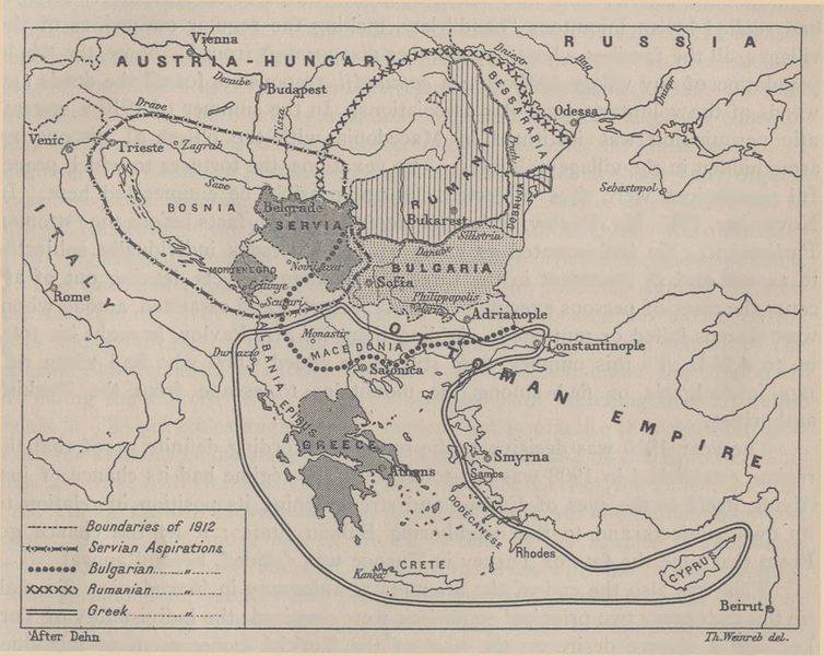 1912 yılı Balkan Haritası.